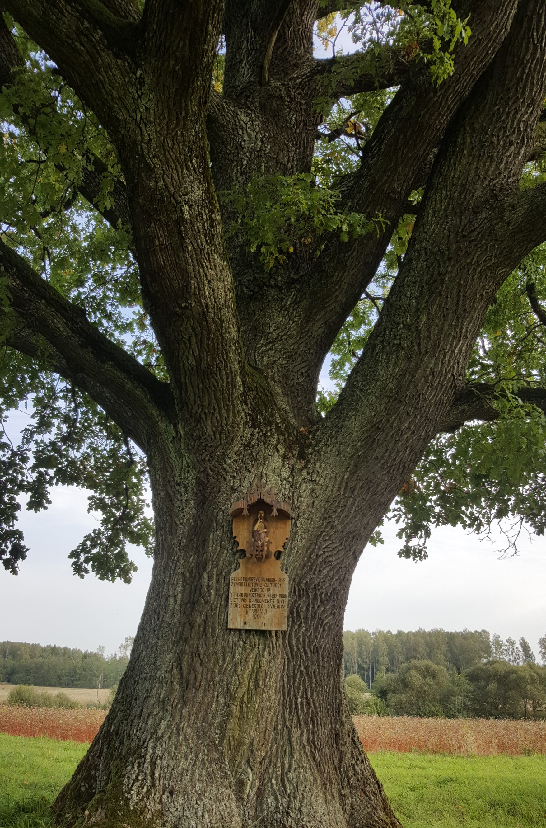 Atminimo lenta gen. Stasiui Pundzevičiui ir rašytojui Petrui Pundzevičiui